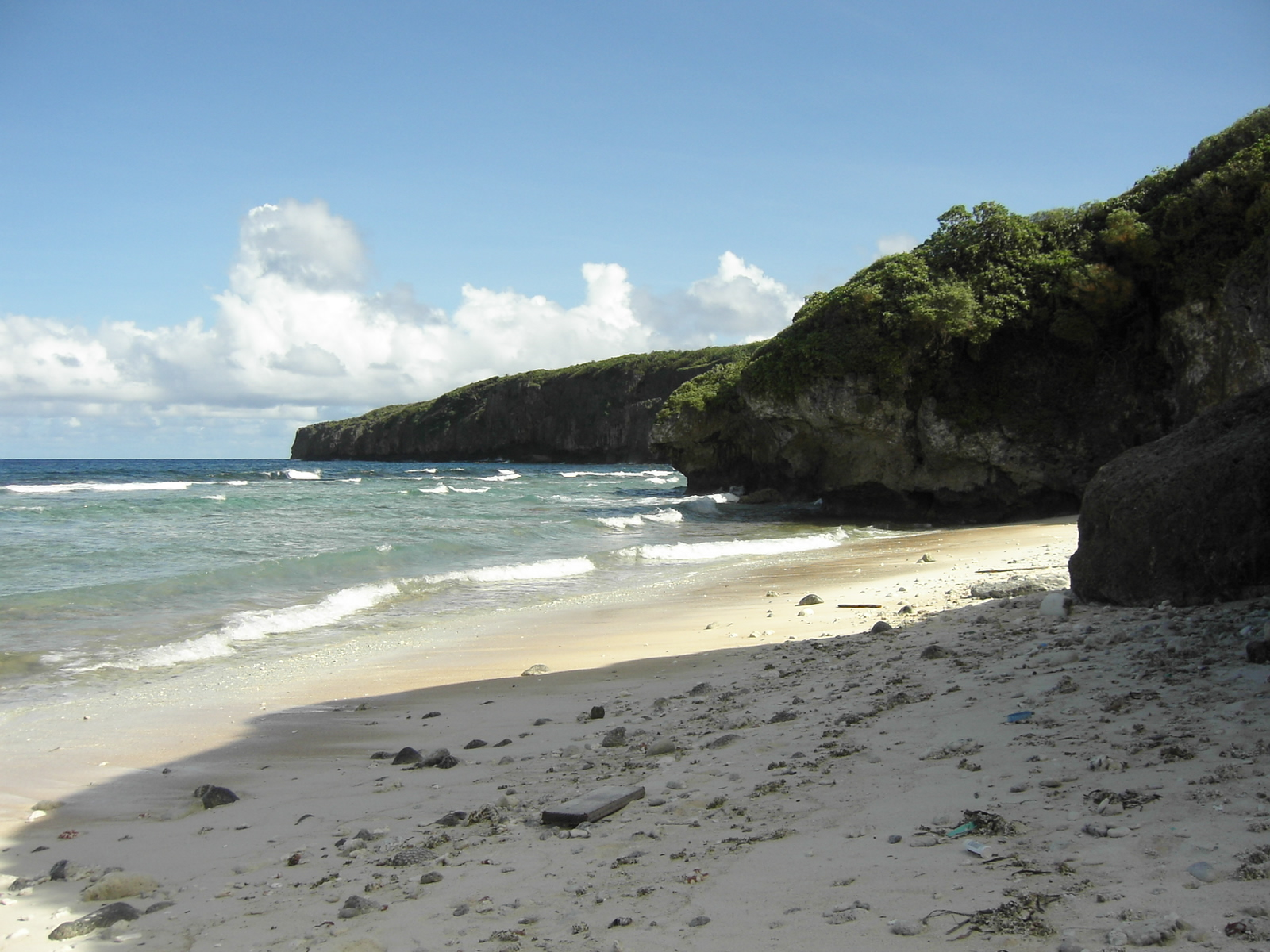 Masalok Beach - Tinian